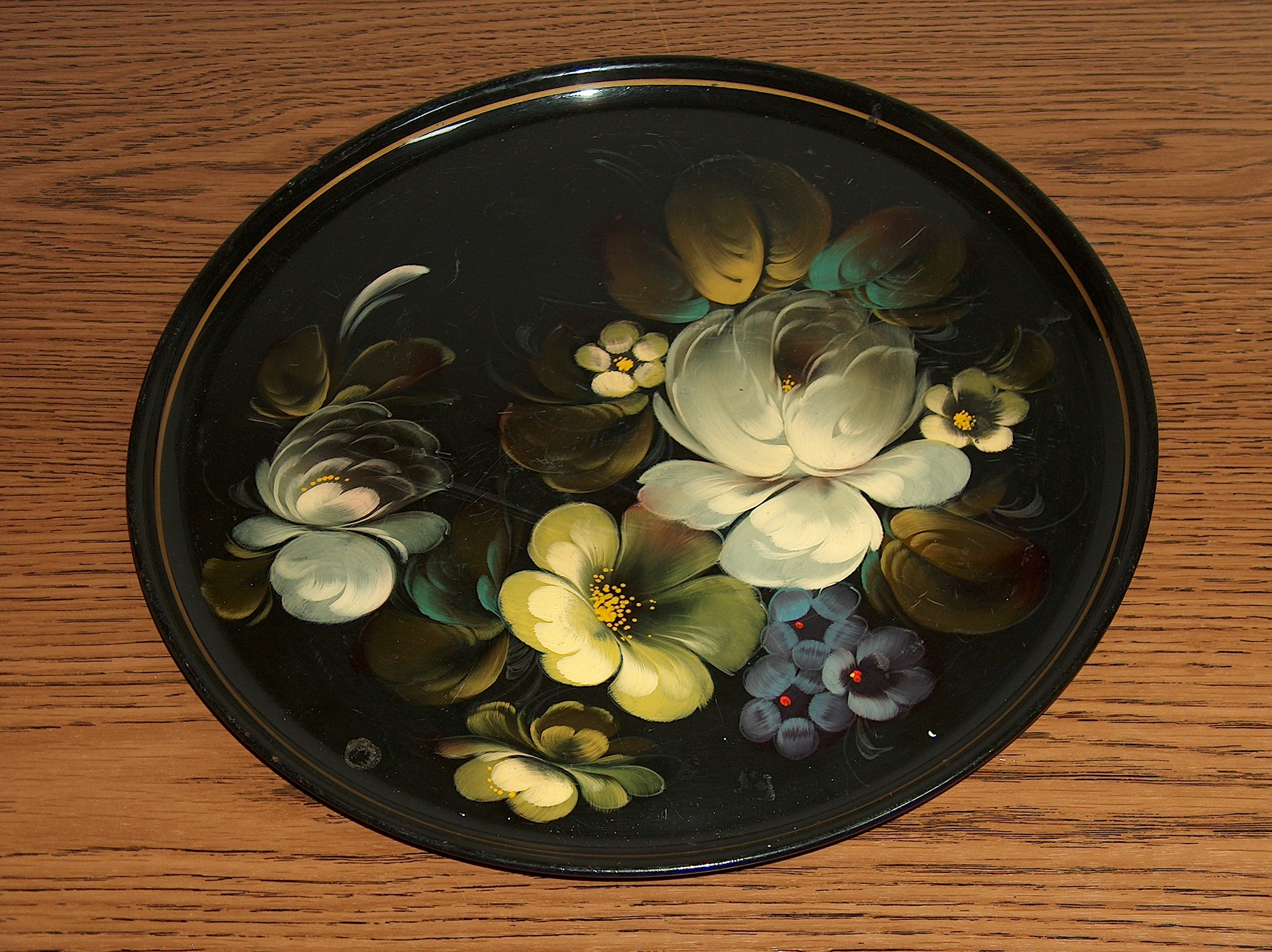 Ein russisches Tablett